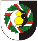 znak obce